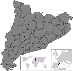 Localització del Pont de Suert . Location of El Pont de Suert in Catalonia.